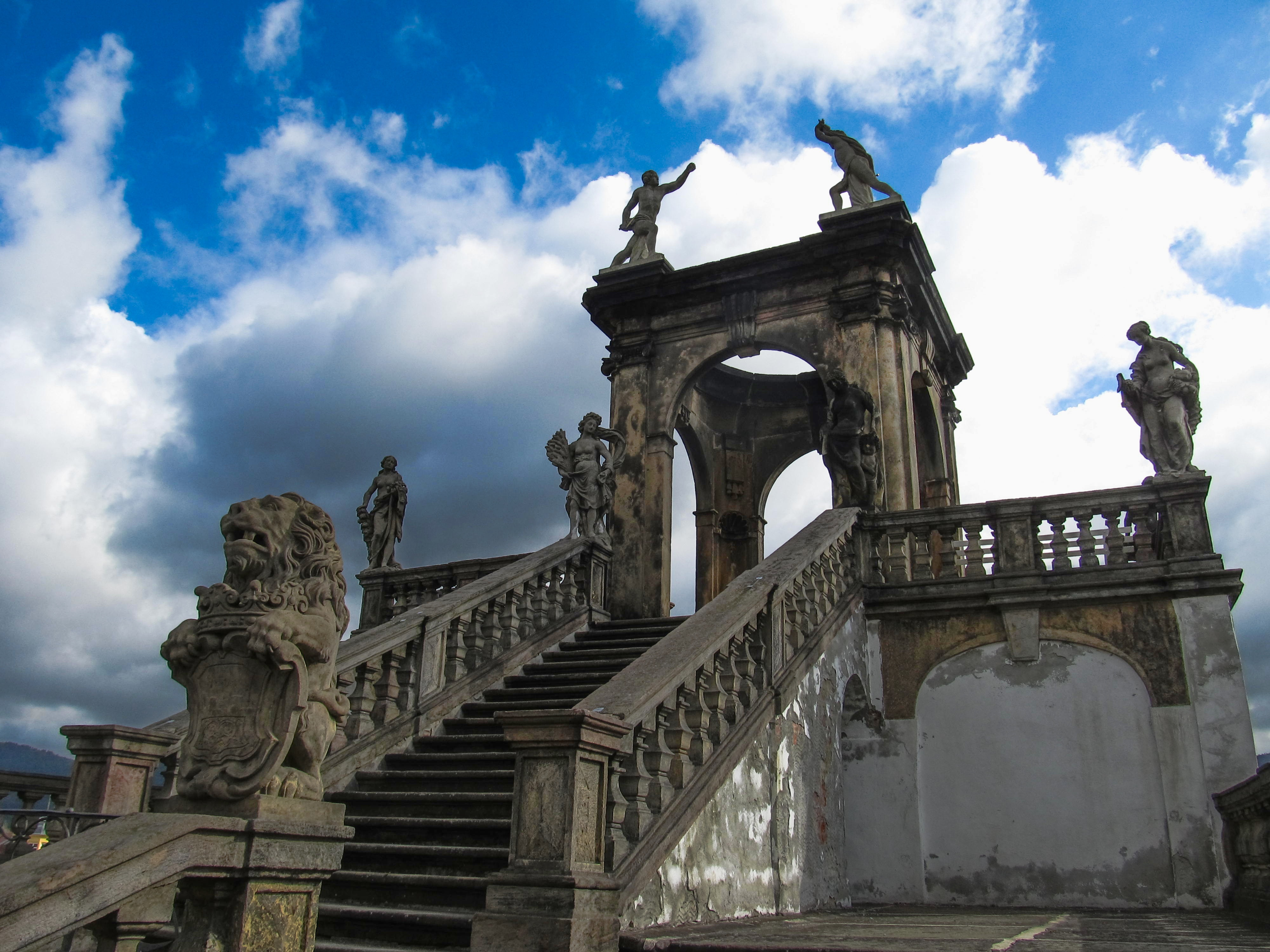 Vyhlídkový gloriet v Růžové zahradě u zámku